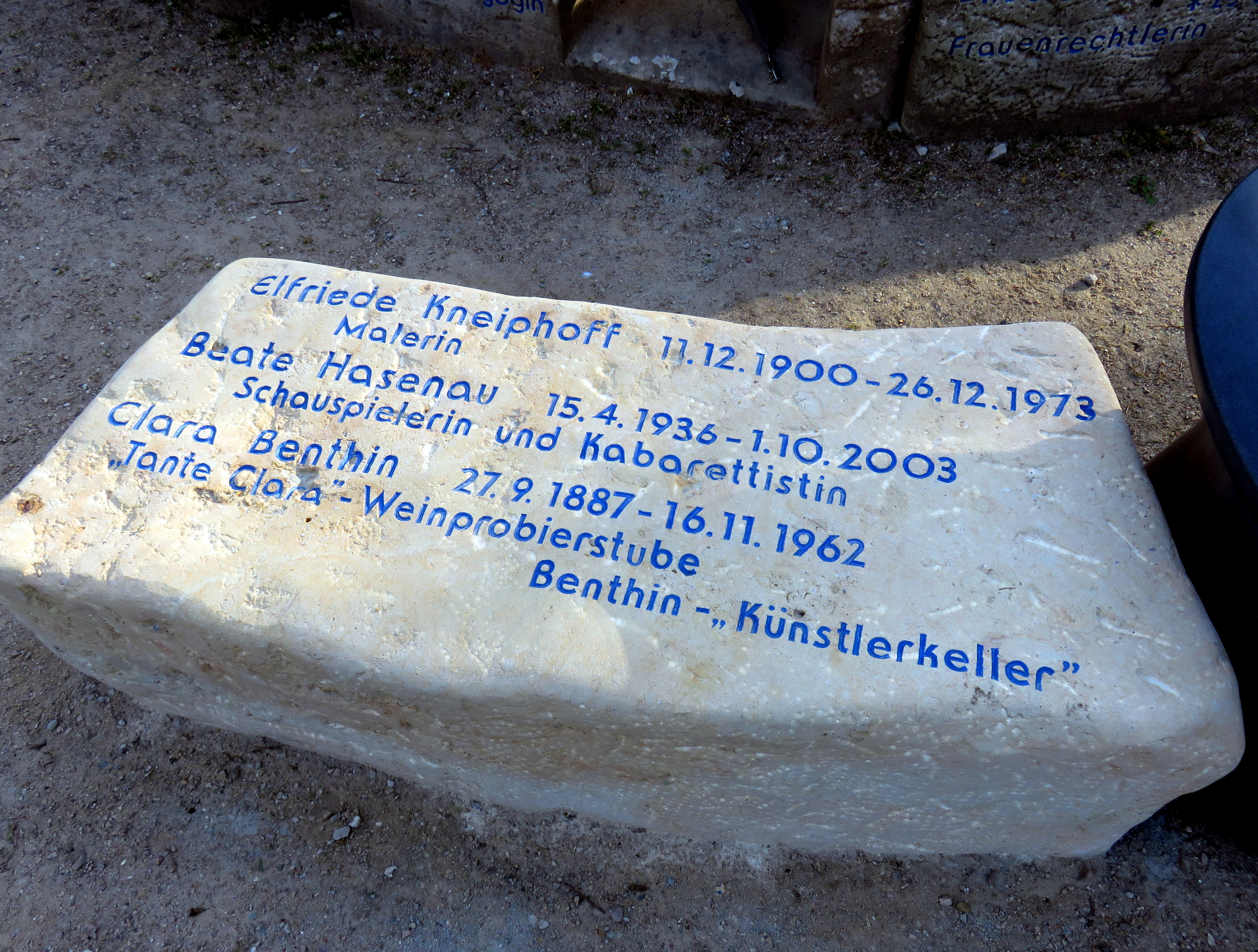 Gedenkstein für Elfriede Kneiphoff (Malerin), Beate Haseau (Schauspielerin) und Clara Benthien (Wirtin) in der Erinnerungsspirale im Bereich des Gartens der Frauen auf dem Ohlsdorfer Friedhof in Hamburg-Ohlsdorf.